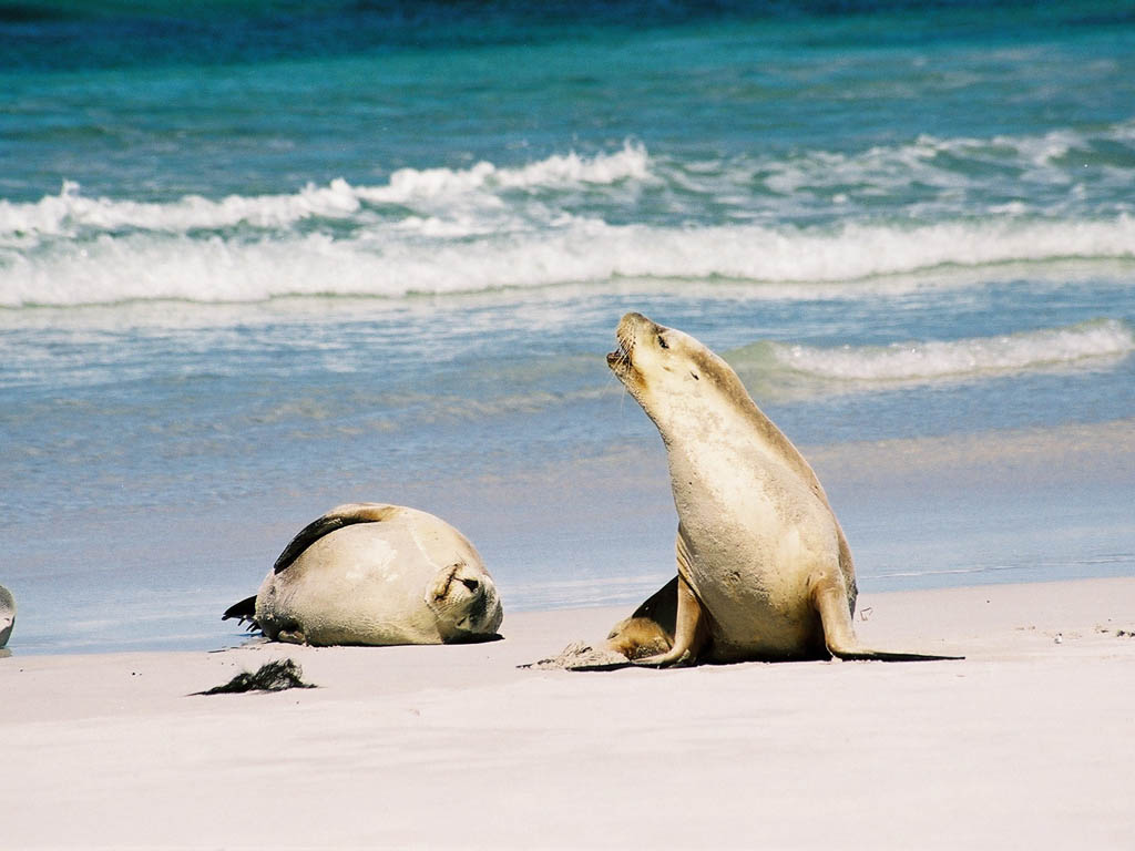 An Australia Sea Lion (Neophoca cinerea) vocalizing.